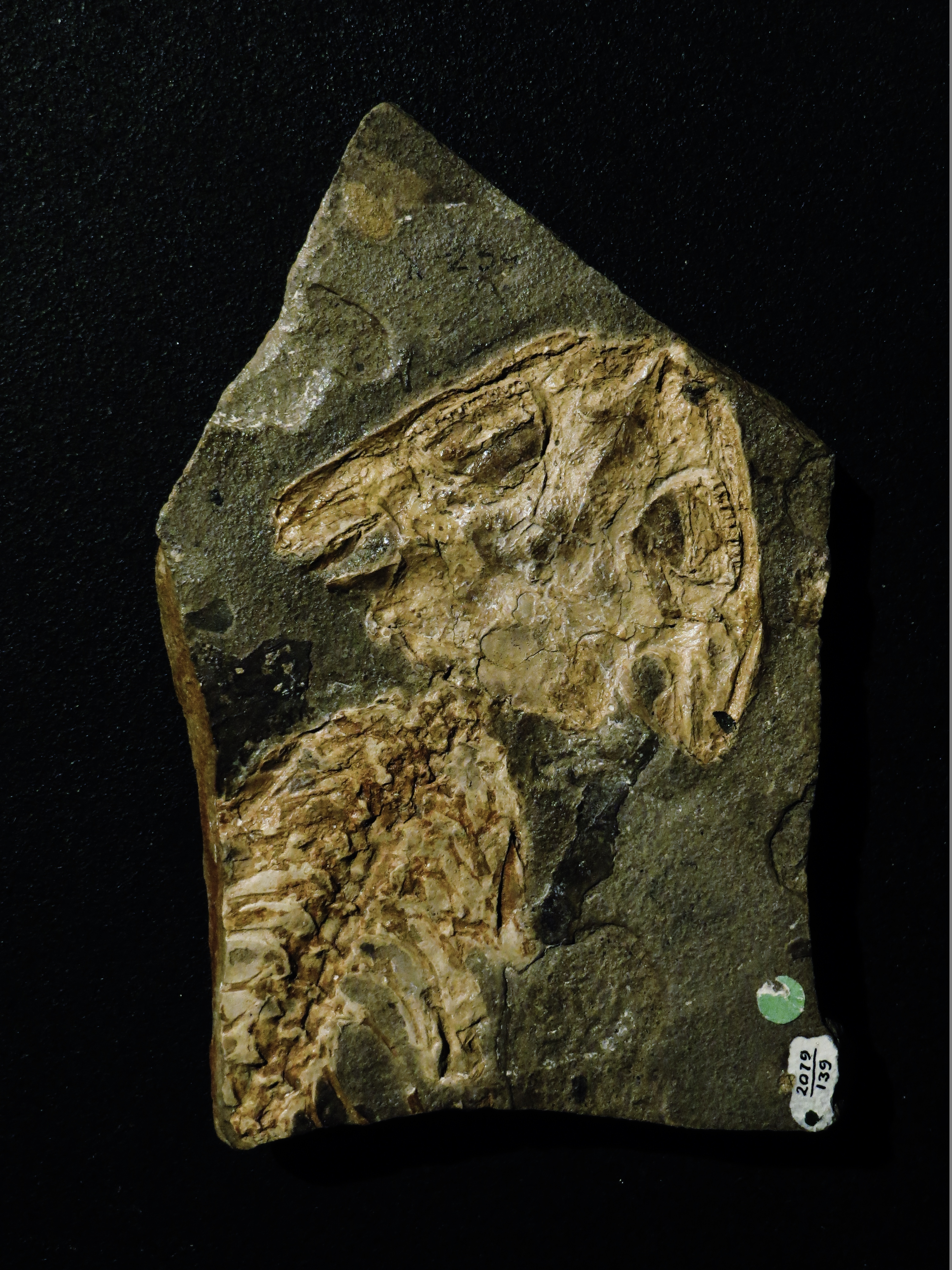 Fossil of Utegenia, an extinct reptiliomorph- Took the picture at Dinosaurium, Prague